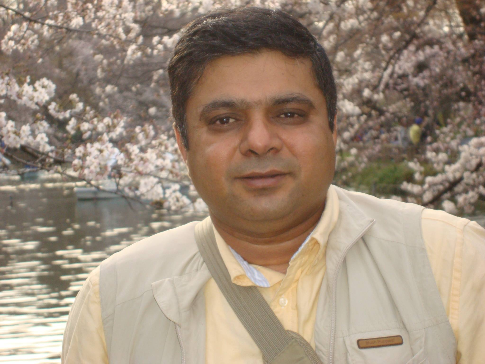 ڈاکٹر سہیل عباس خان بلوچ